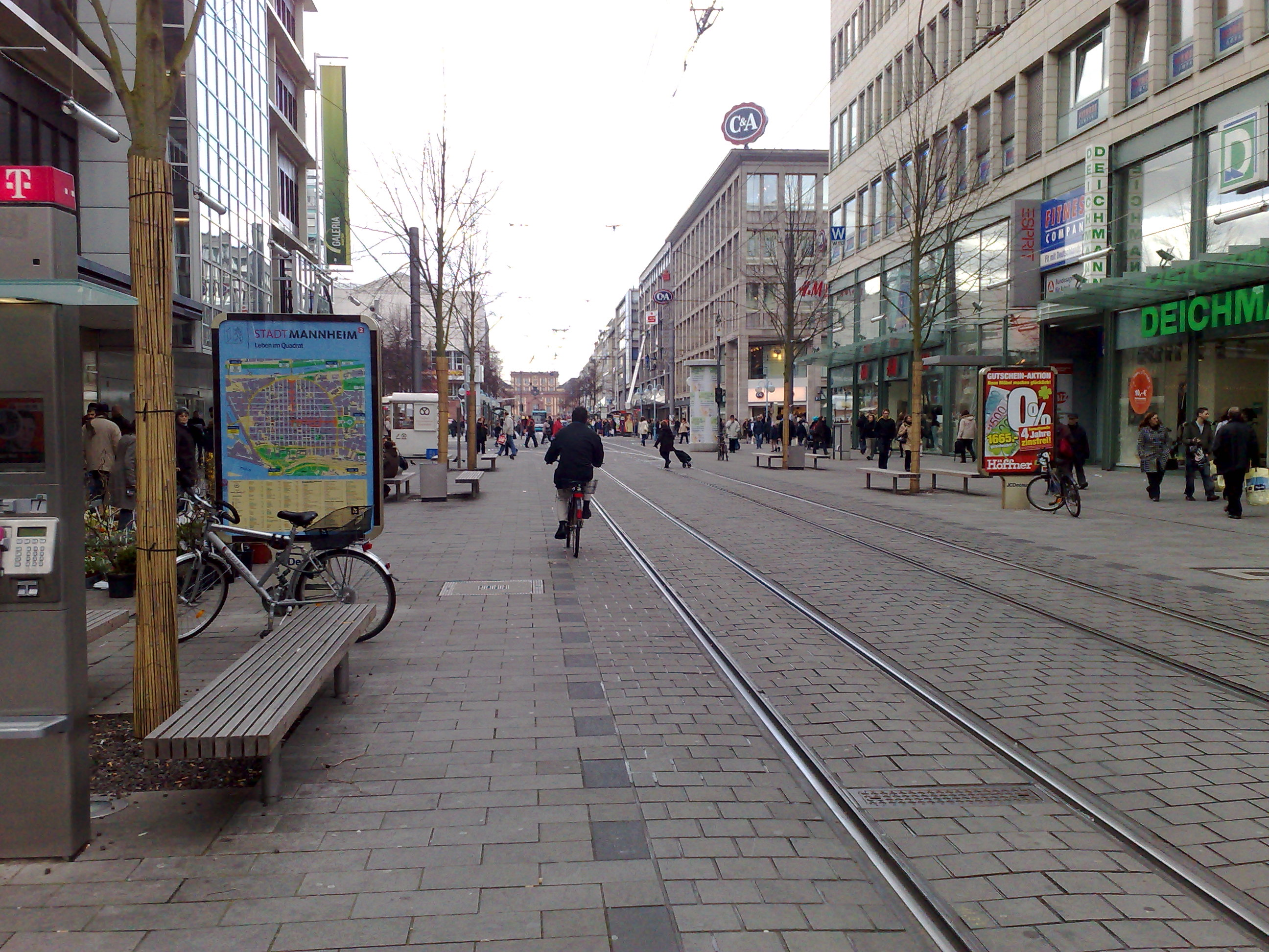 Szene aus der Fußgängerzone in der Innenstadt